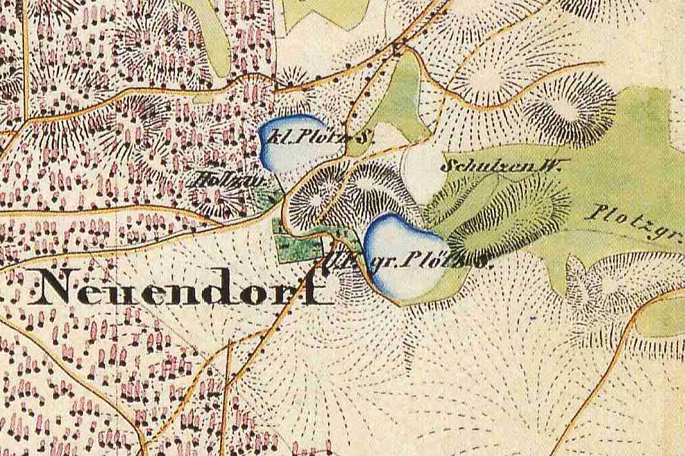 Karte von Neuendorf, Kreis Ruppin, Provinz Brandenburg, 1840